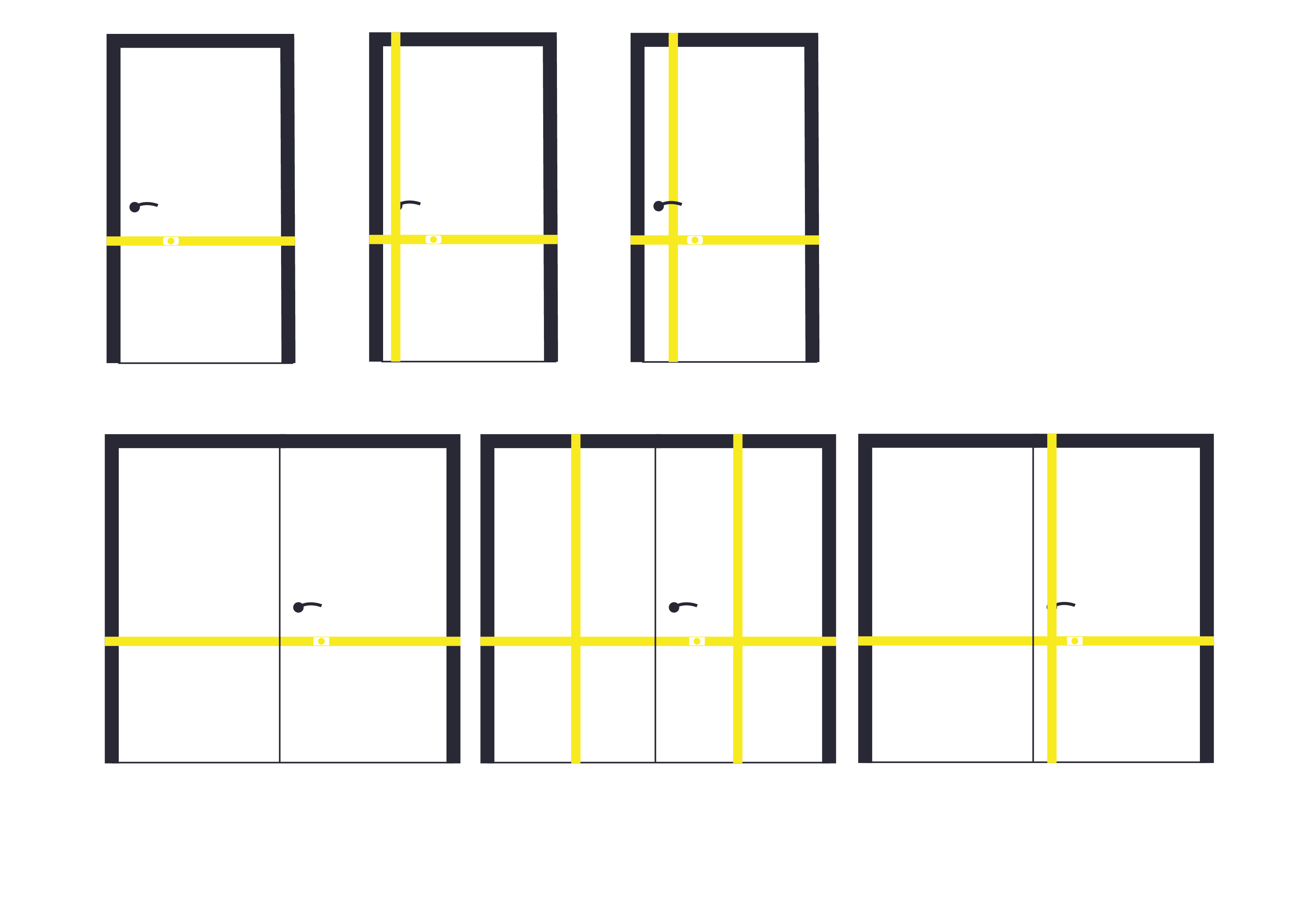 Grafik von Balkenschloss-Konstruktionen